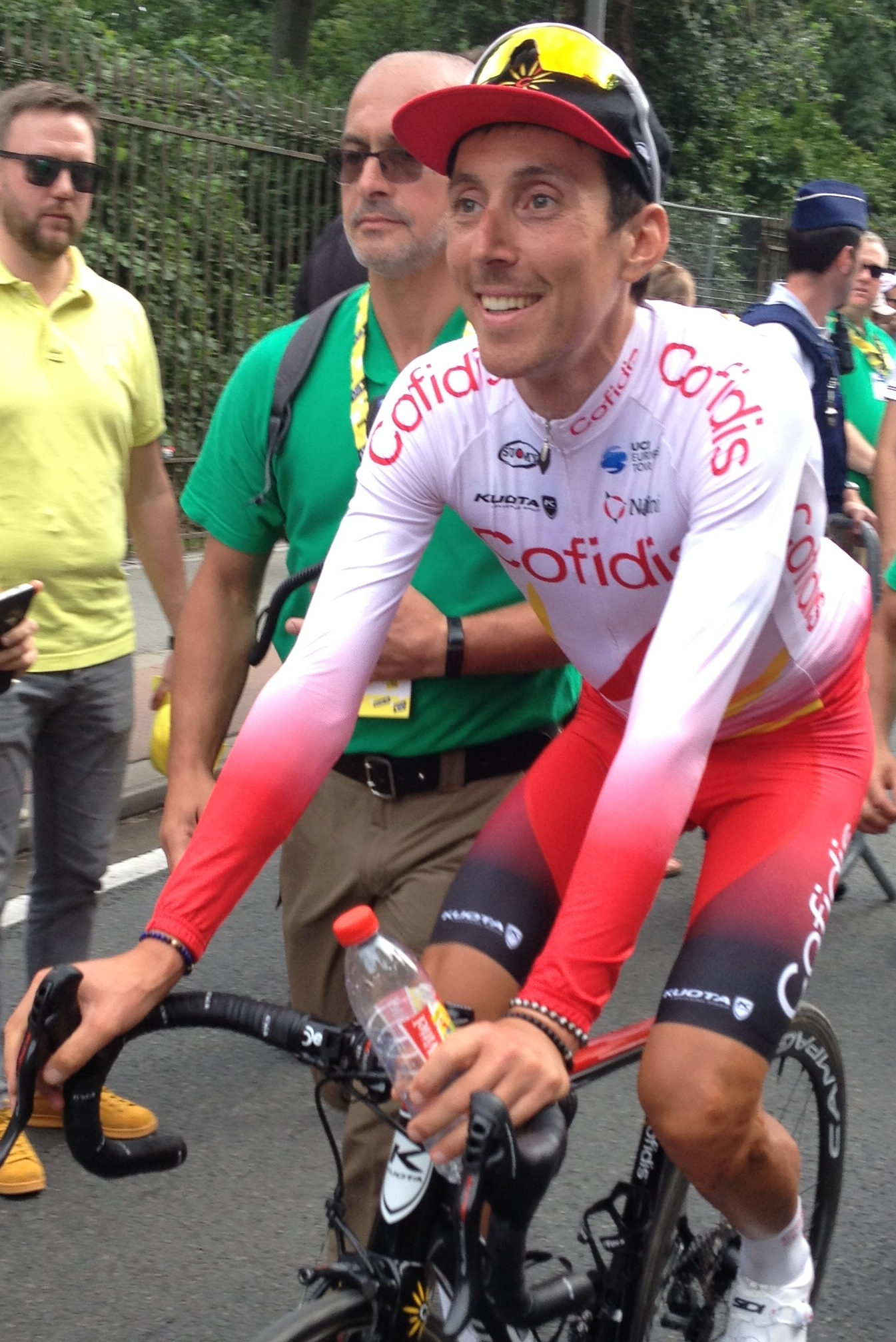 Grand Départ van de Tour de France in Brussel, finish in Laken op zaterdag 6 juli 2019